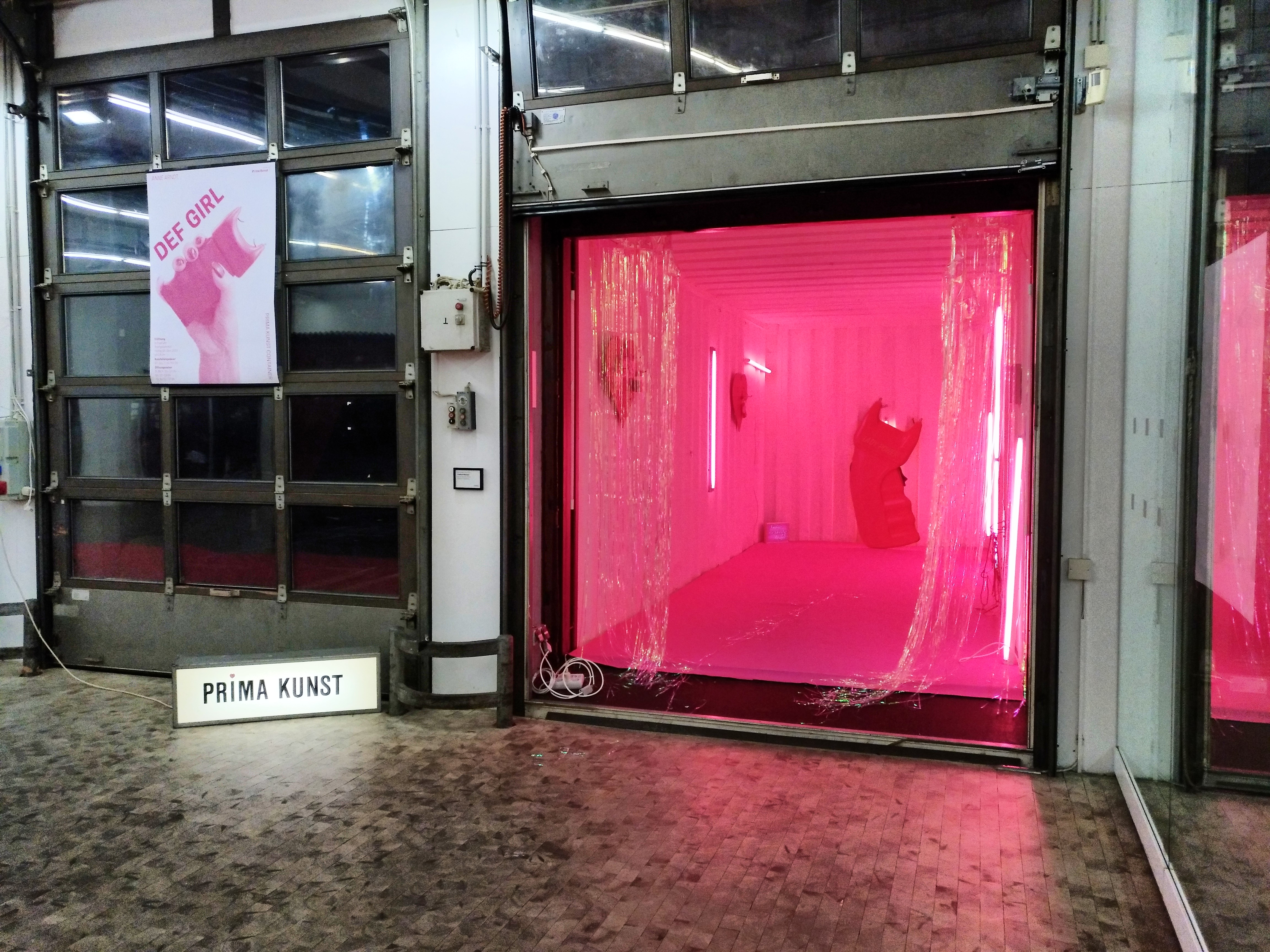 Der Container des Prima Kunst-Vereins im Foyer der Stadtgalerie Kiel. Im Container befindet sich die Ausstellung Def Girl von Anne Arndt, welche vom 07.12.2019 bis zum 16.02.2020 dort zu sehen war.